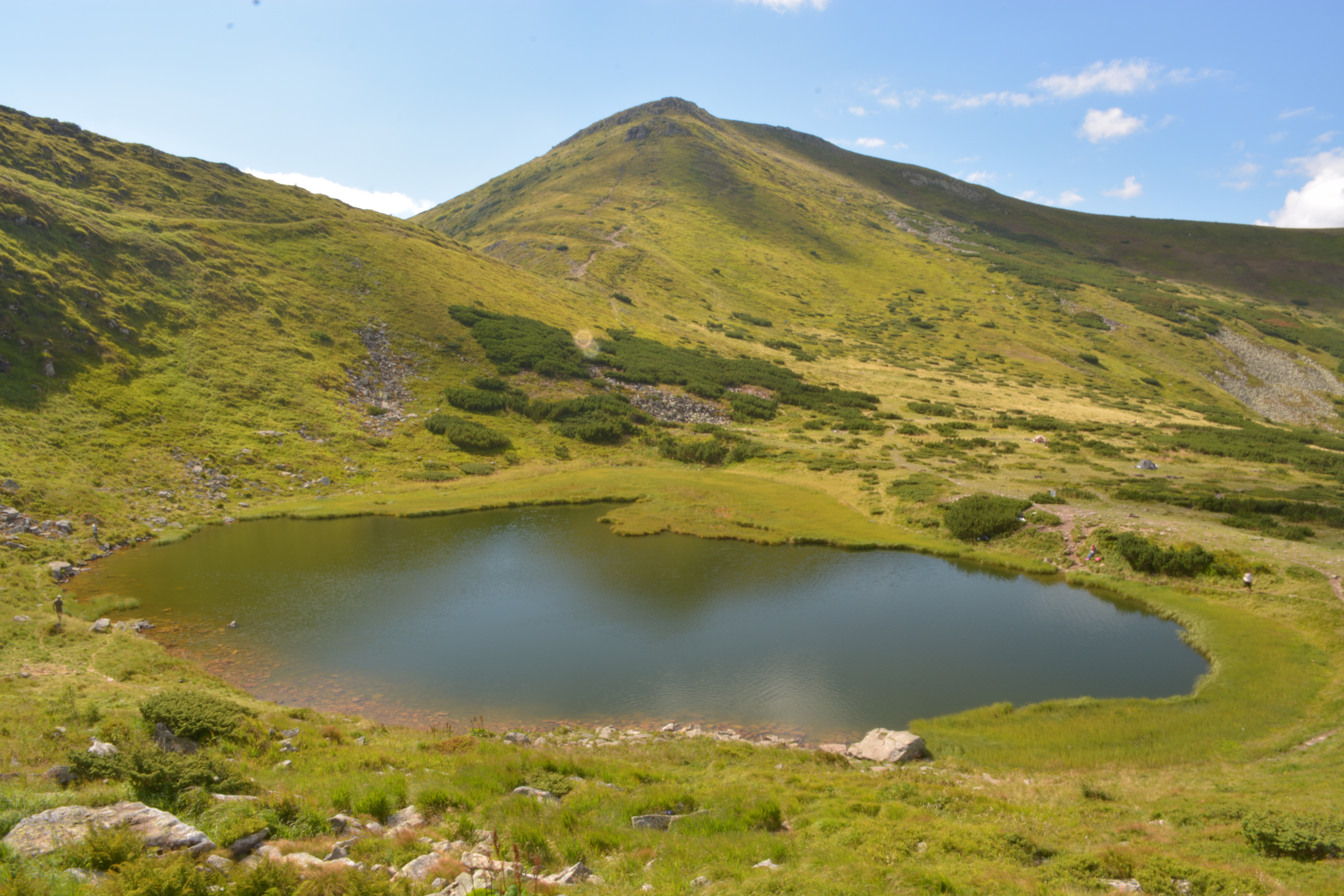 Озеро Несамовите - загальний вид з південного сходу